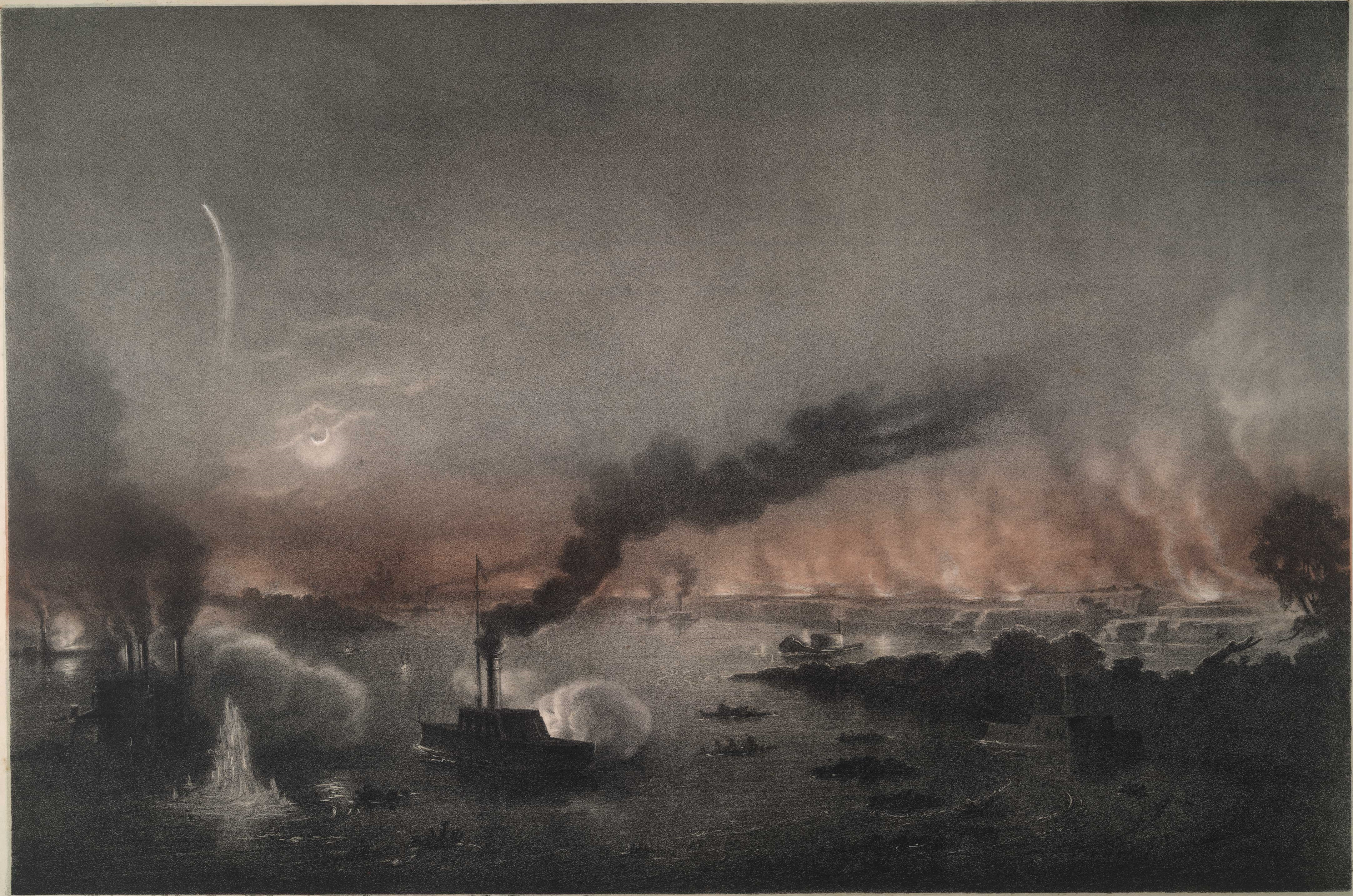 Passagem de Humaytá